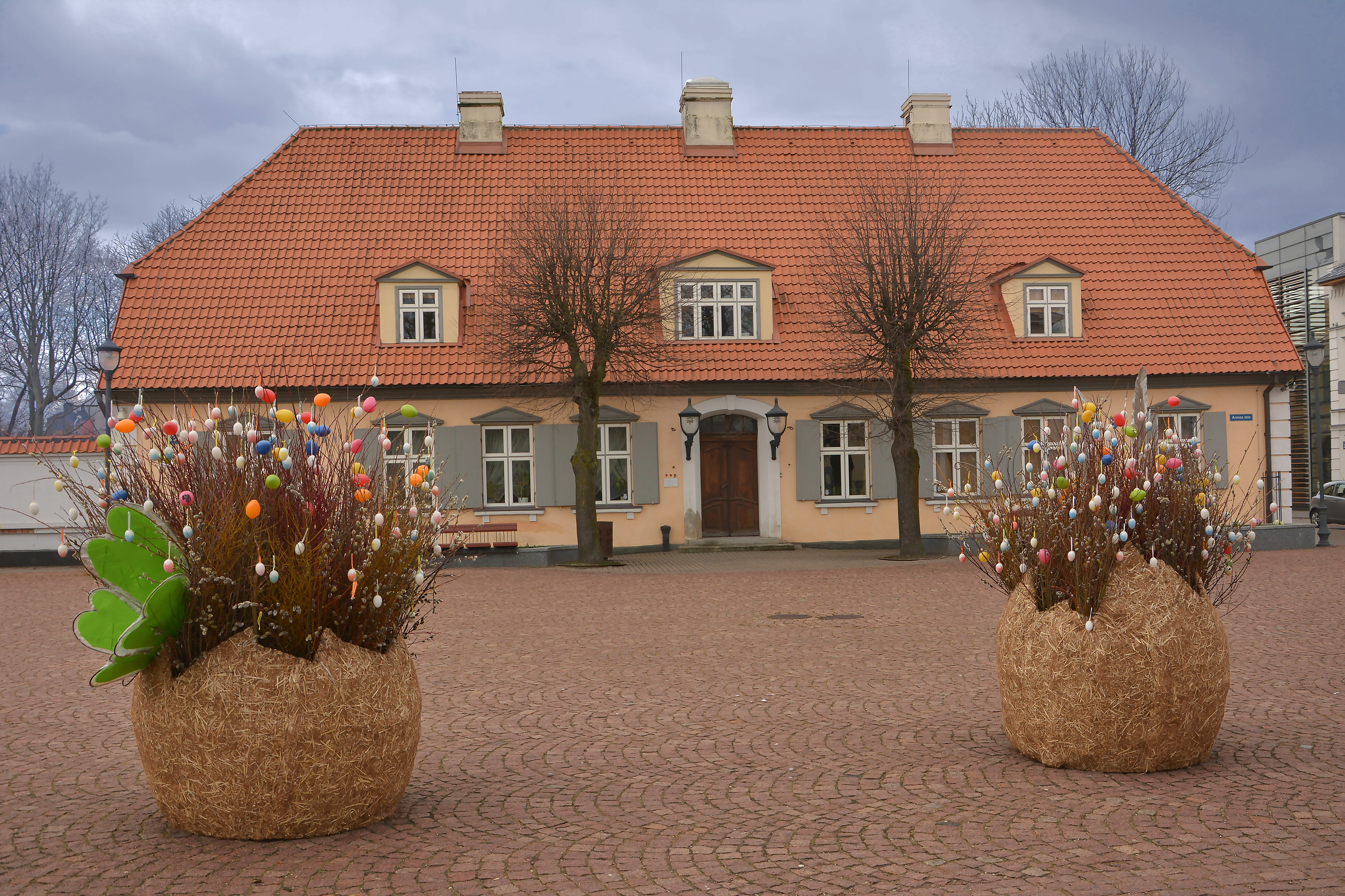 Rātsnams -tagad Rakstnieku māja Ventspilī Annas 13